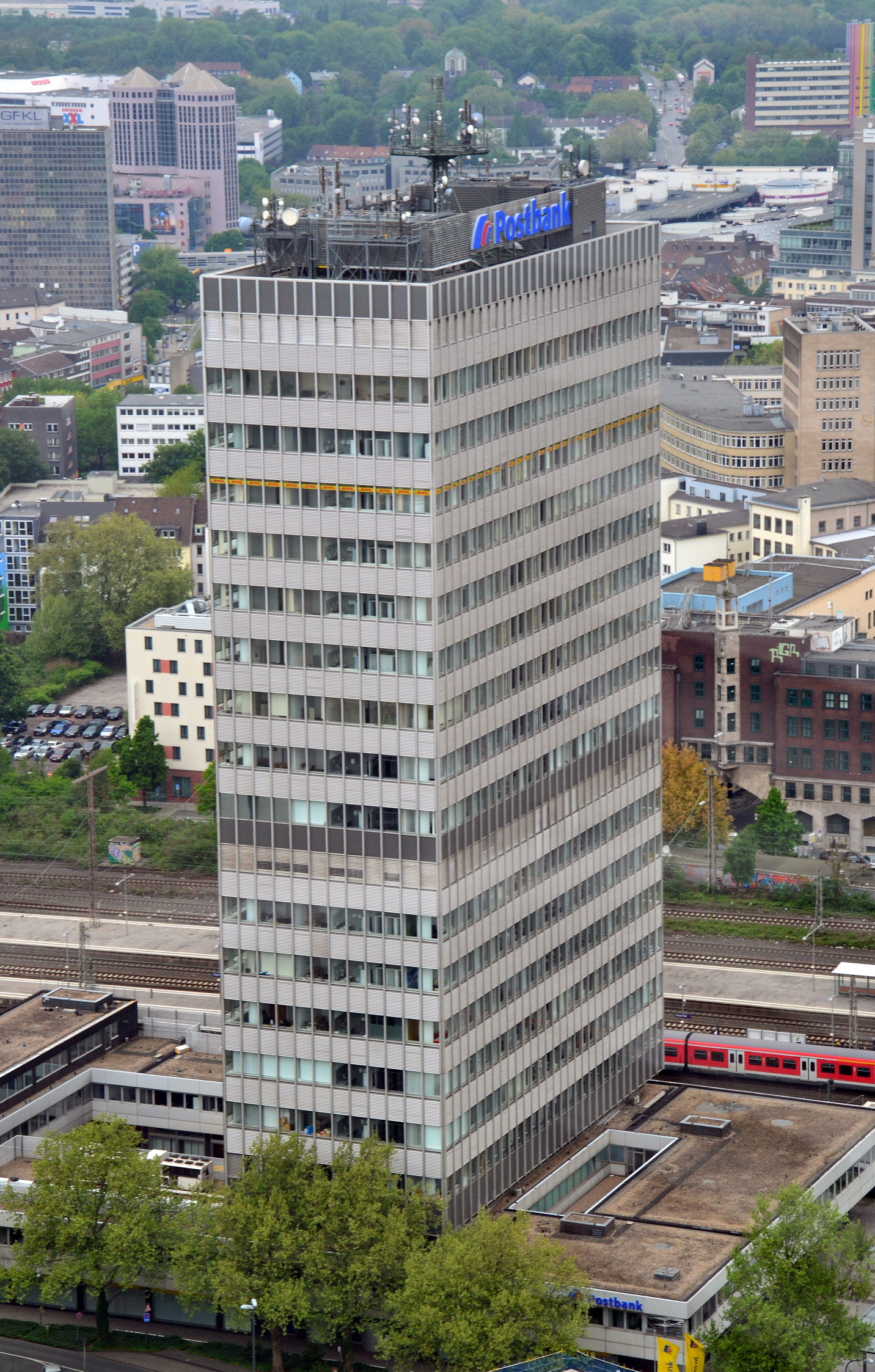 Postbank-Hochhaus in Essen, Ansicht von Südosten